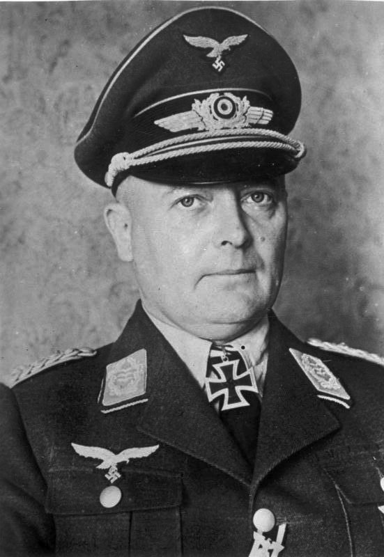 Oberst Heidrich wurde vom Führer für seinen todesmutigen Einsatz mit den Fallschirmtruppen auf Kreta mit dem Ritterkreuz des Eisernen Kreuzes ausgezeichnet. Scherl Bilderdienst Juli 1941